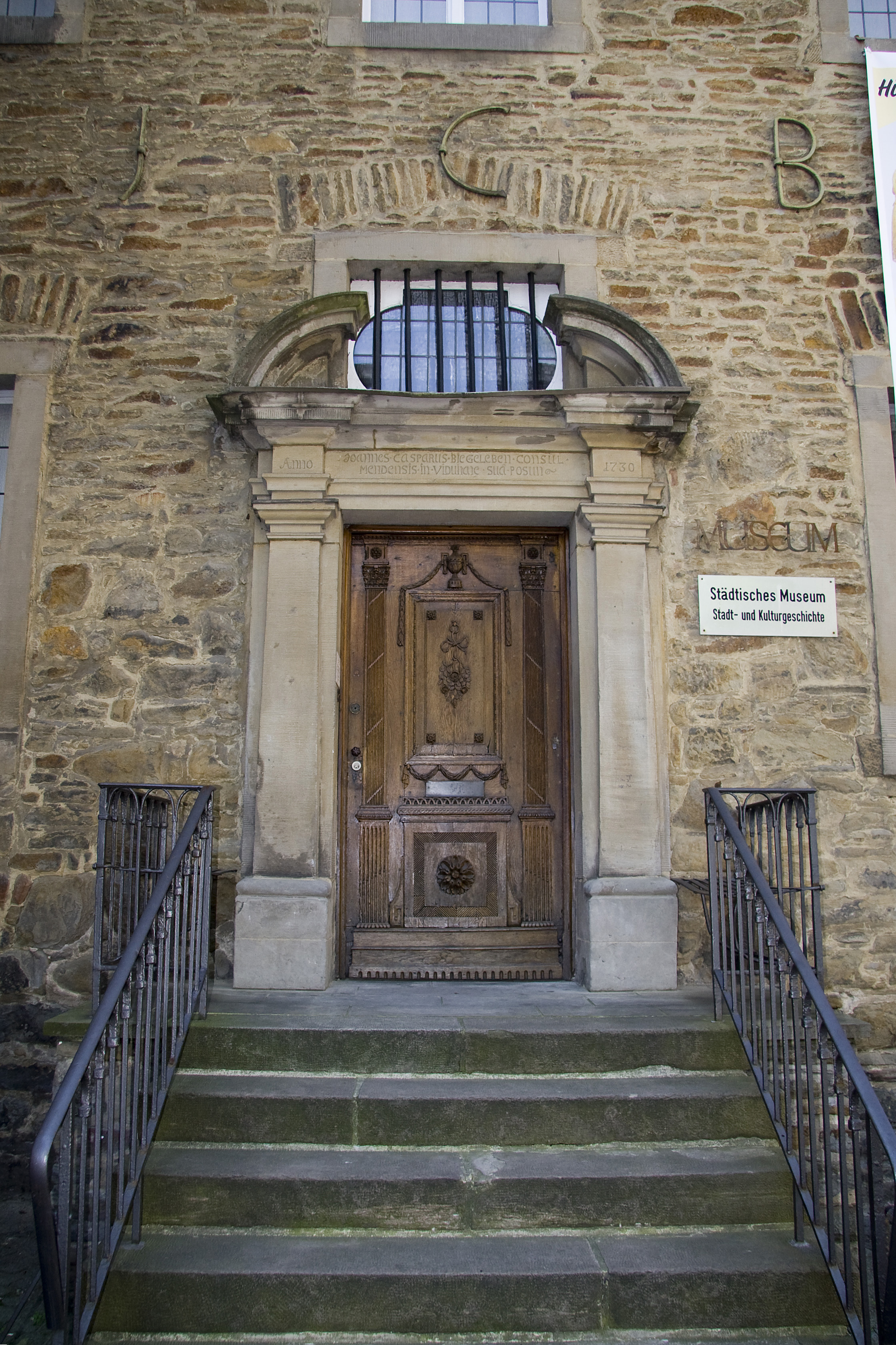 Eingangsportal des Stadtmuseums in Menden